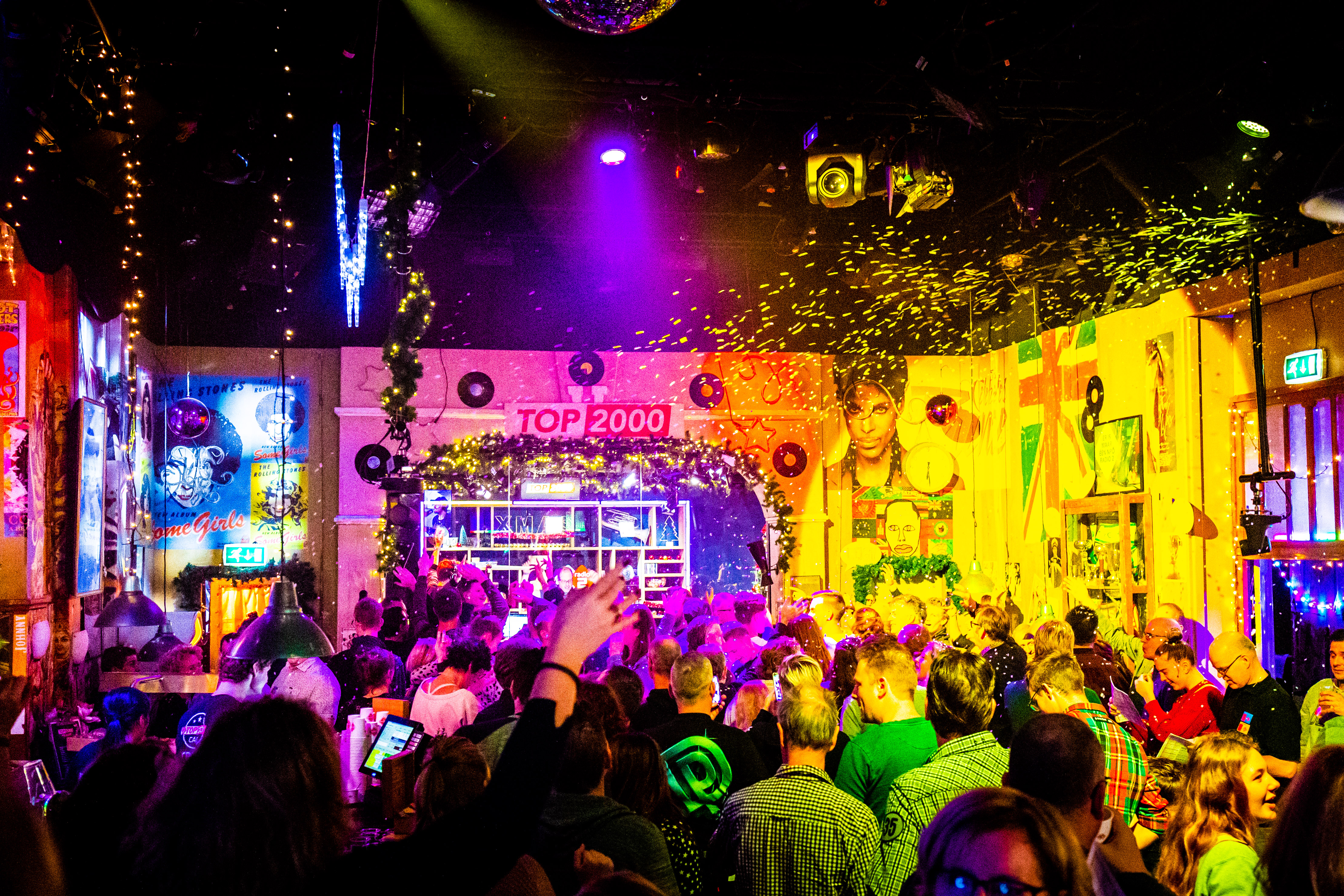 Top 2000 café van NPO Radio 2 bij Beeld en Geluid tijdens de editie van 2018